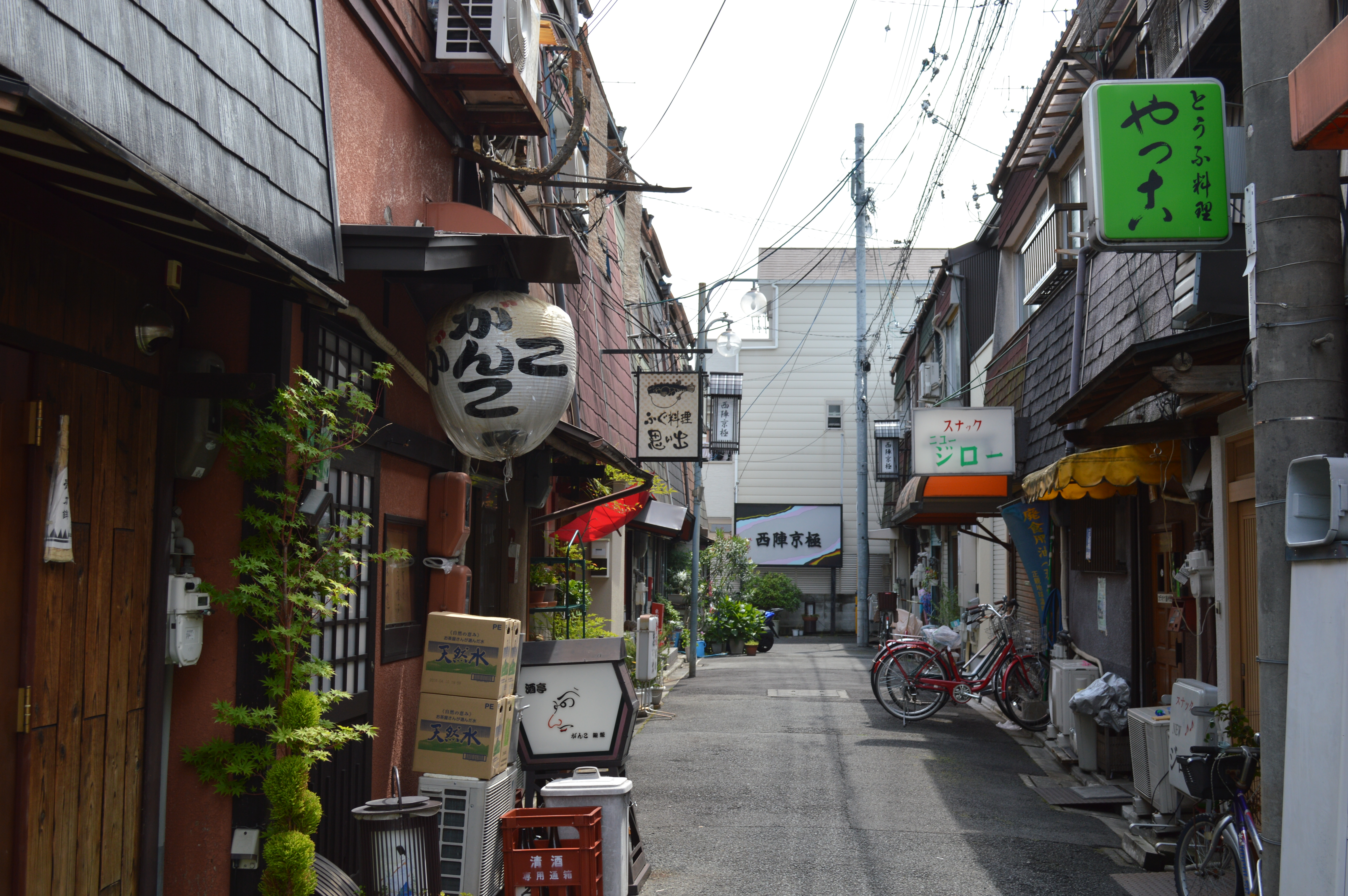 京都市上京区 西陣京極中央部にある飲み屋。奥が東。正面が行き止まりに見えるが、左手にクランク状の路地が続いている